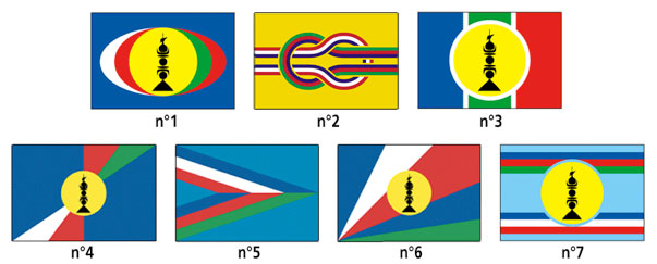 Résultat de la seconde consultation organisée en 1999 auprès des internautes par le site «Un drapeau pour la Nouvelle-Calédonie/Kanaky» de Pierre Gay, Pascal Gross et Thanh-Tâm Lê concernant le futur drapeau de la Nouvelle-Calédonie